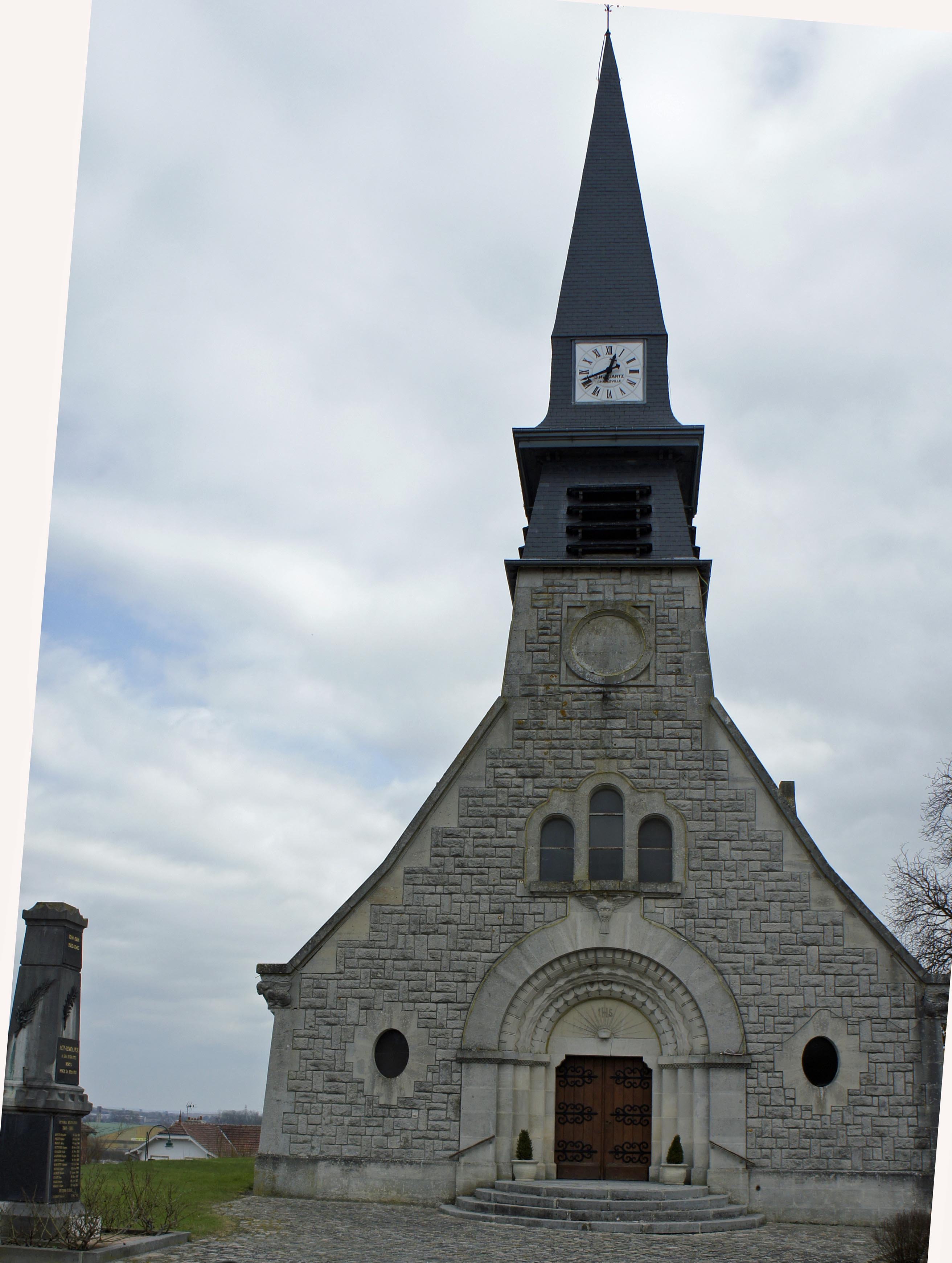 Eglise et monument aux morts d'Acy-Romance.